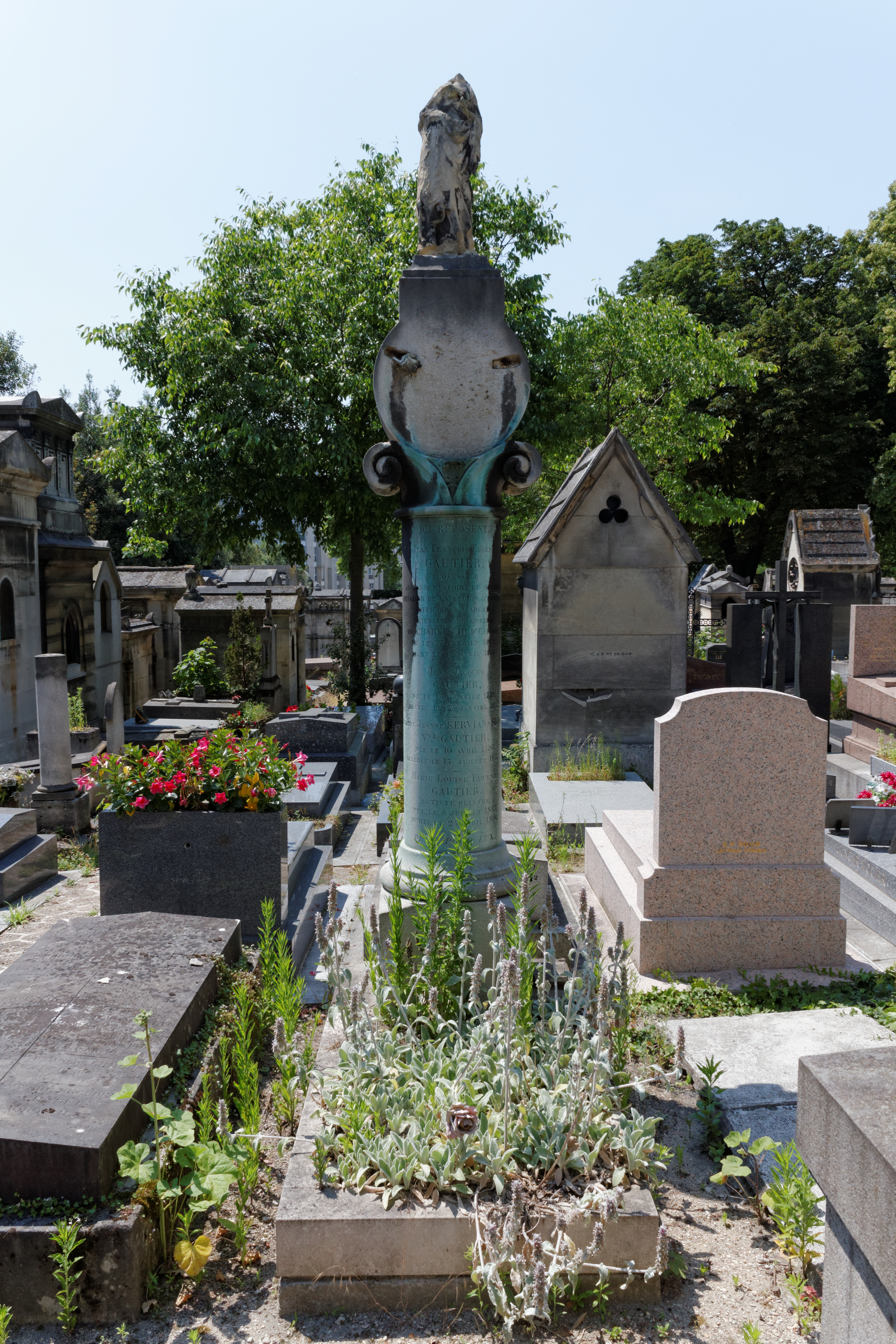 Sépulture d'Eugène Gautier (1822-1878), violoniste et compositeur français. Colonne qui était à l'origine ornée d'un médaillon en bronze.